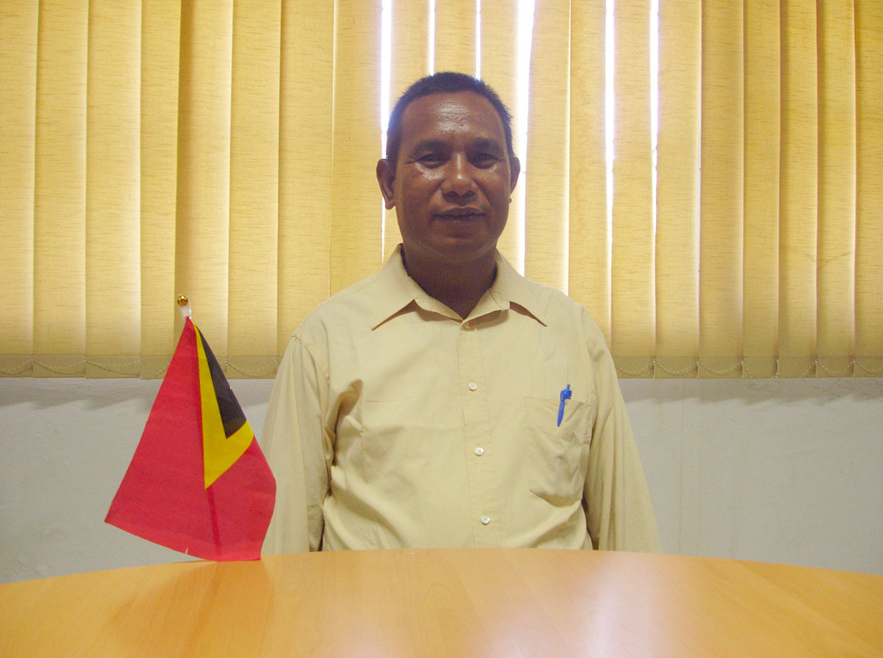 Domingos dos Santos, Administrator des Subdistrikts Lospalos